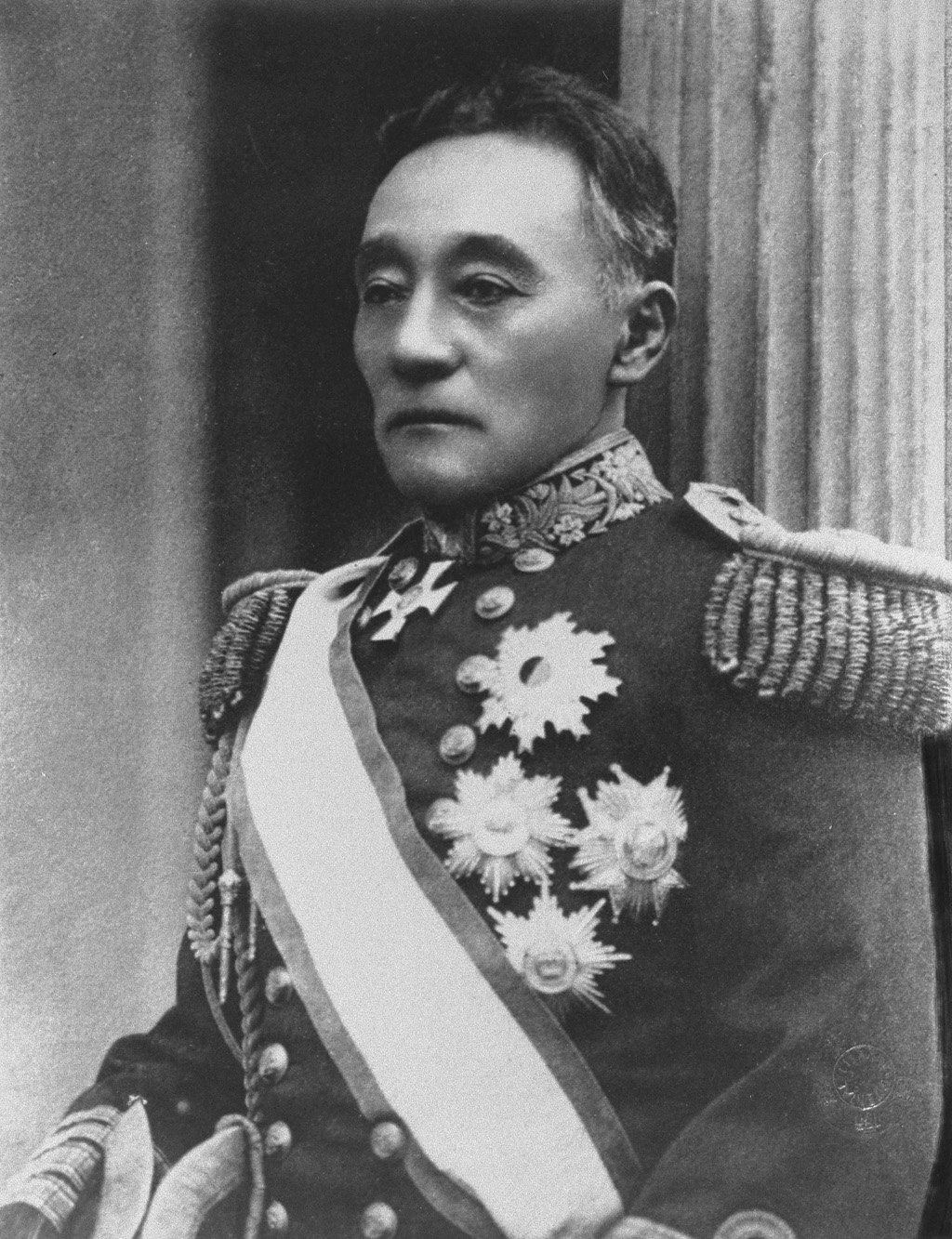 Portrait of Kawamura Sumiyoshi (川村純義, 1836 – 1904)